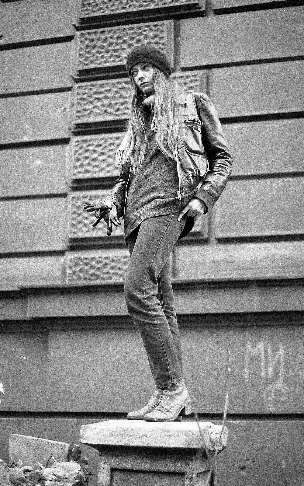 Снимио Ранко Томић, 1995. Соња на стубу ограде испред зграде техничког факултета у Београду. Непоновљива. Имајте у виду да ће свако комерцијално коришћење ове фотографије, супротно одредбама лиценце под којом је објављена, бити судски гоњено. Соња на стубу ограде испред зграде техничког факултета у Београду. Непоновљива.